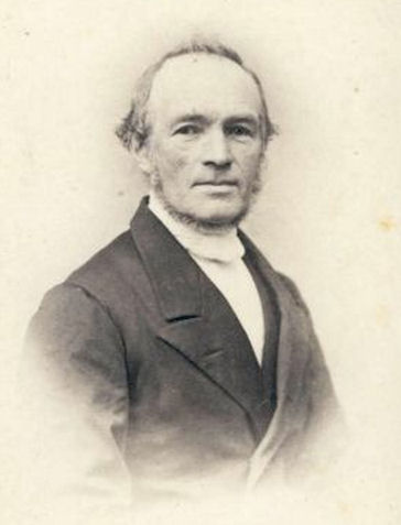 Fokke Sytzes Reiding (1808-1887), burgemeester van Smallingerland